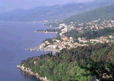 autore: Filip fonte: Filip descrizione: Abbazia licenza d'uso: a libero uso di tutti